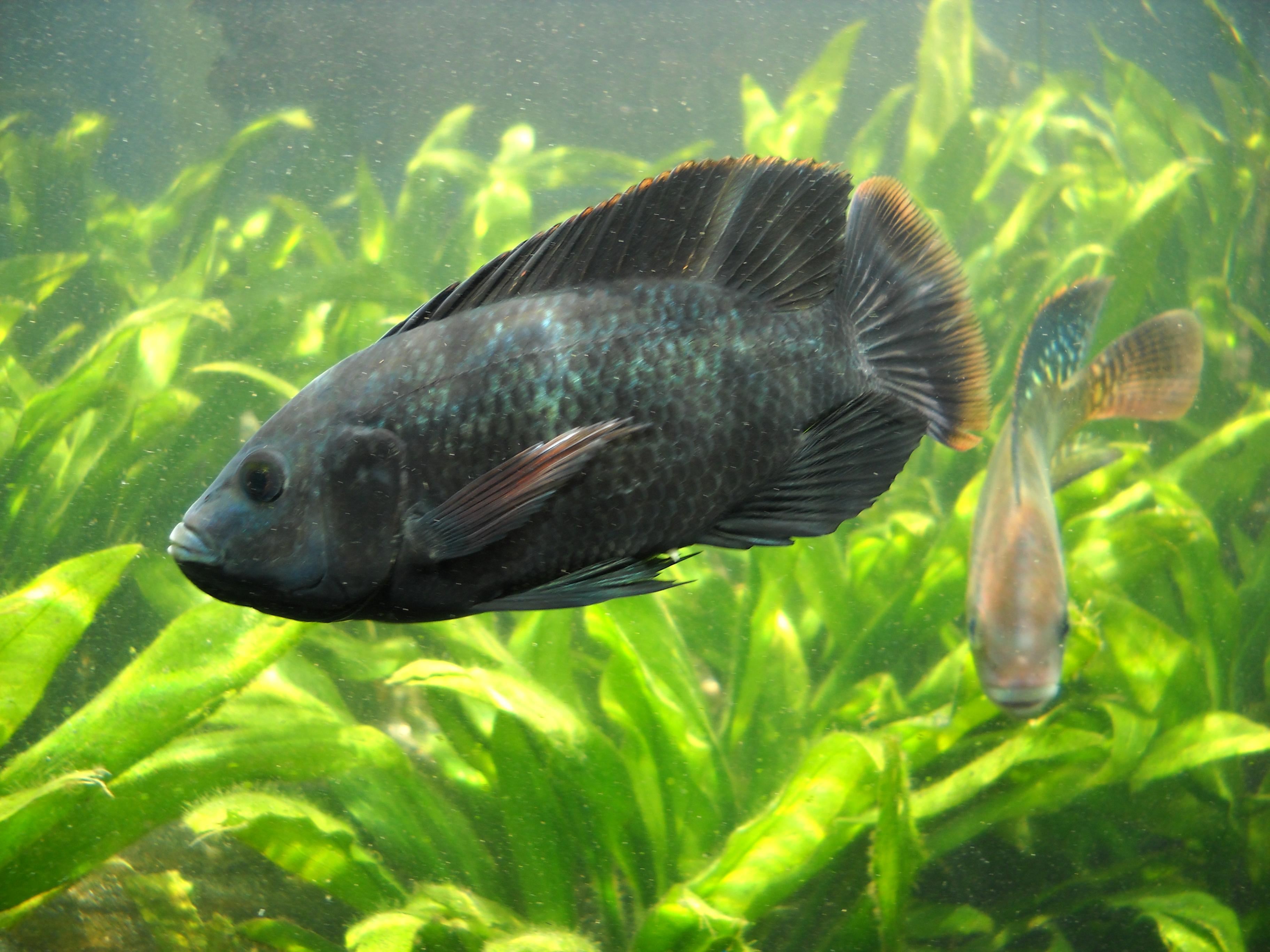 Balzende Tilapias (Oreochromis mossambicus)